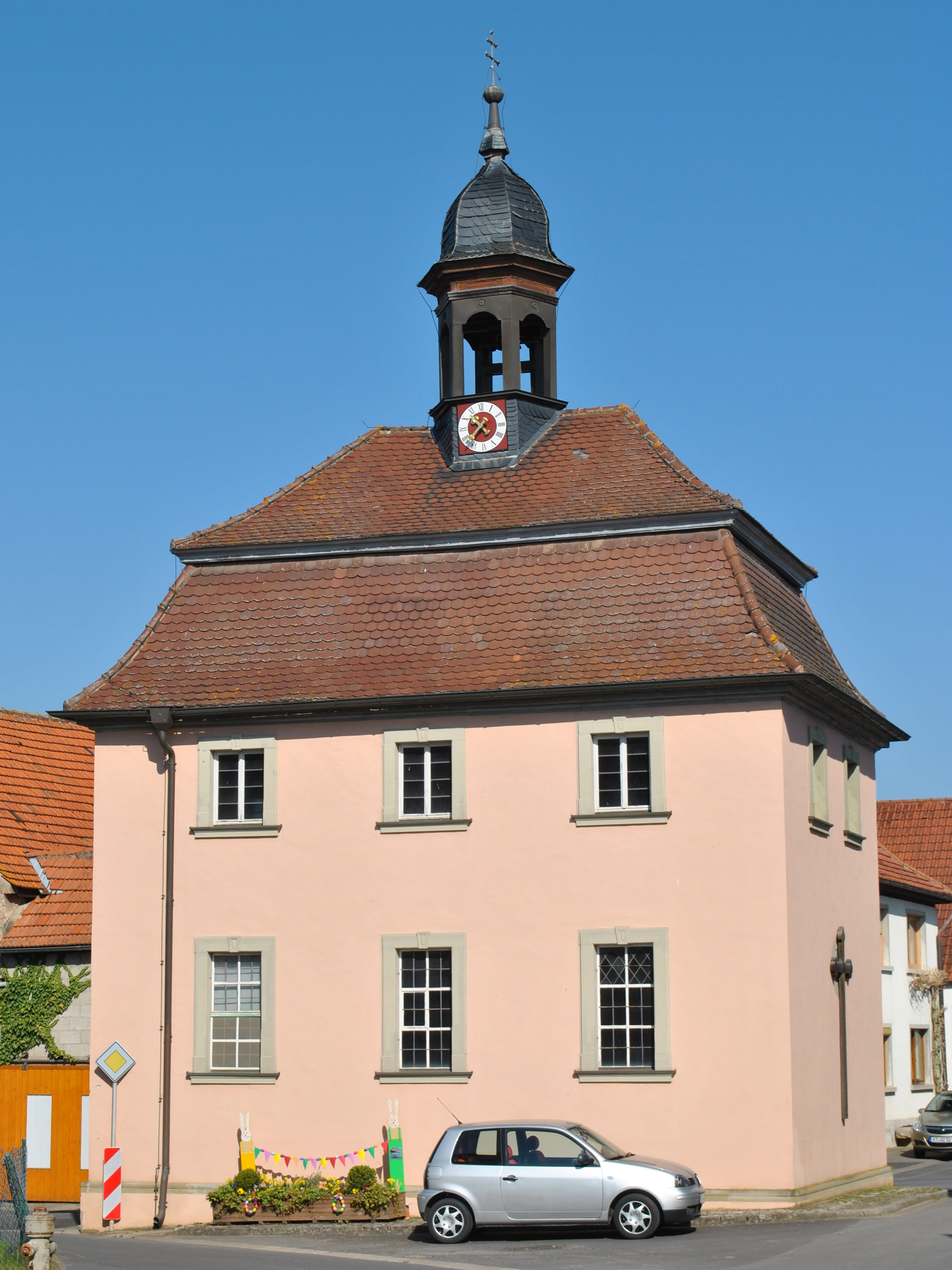 St. Kilian, Atzhausen, Saalbau ohne Chor mit Mansarddach und doppelter Fensterebene; mit Ausstattung; im Obergeschoss war ehemals eine Schule, zugänglich durch einen runden Treppenturm auf der Nordwestseite, um 1748 erbaut